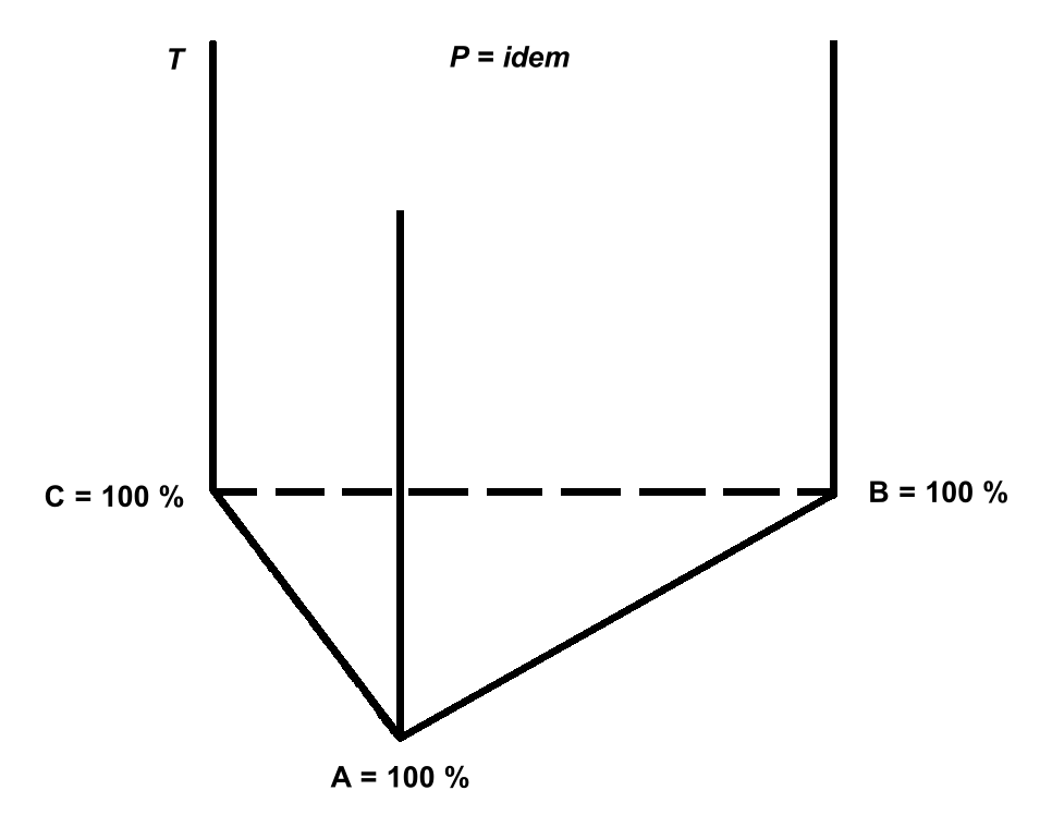 Система координат для построения пространственной диаграммы состав — температура трехкомпонентной системы